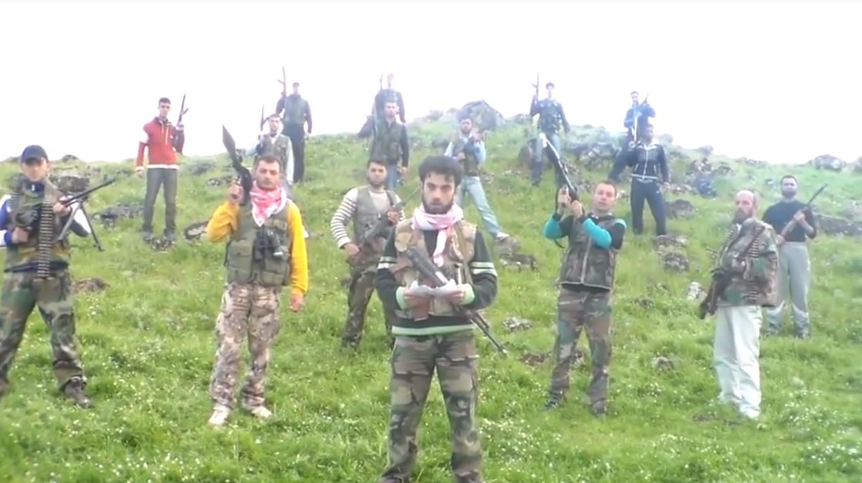 Rebelles syriens de la région de Deraa, le 15 avril 2013.